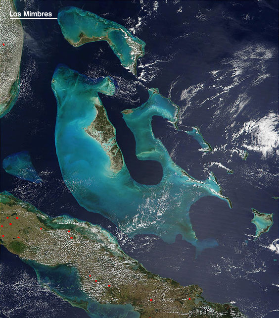 Bahamas Bank - Position du banc de Los Mimbres